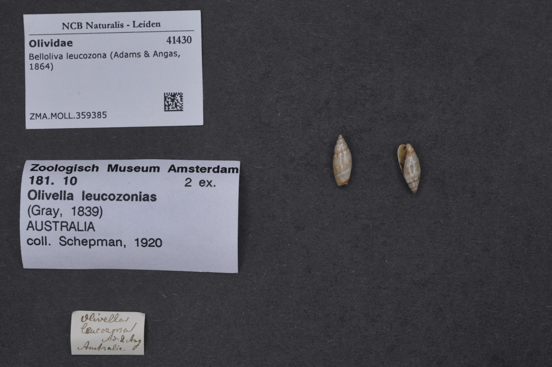 Belloliva leucozona (Adams & Angas, 1864)